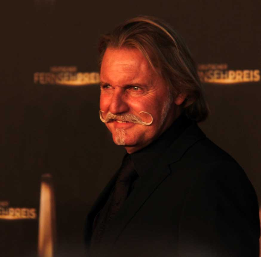 Ingo Lenßen beim Deutschen Fernsehpreis 2012